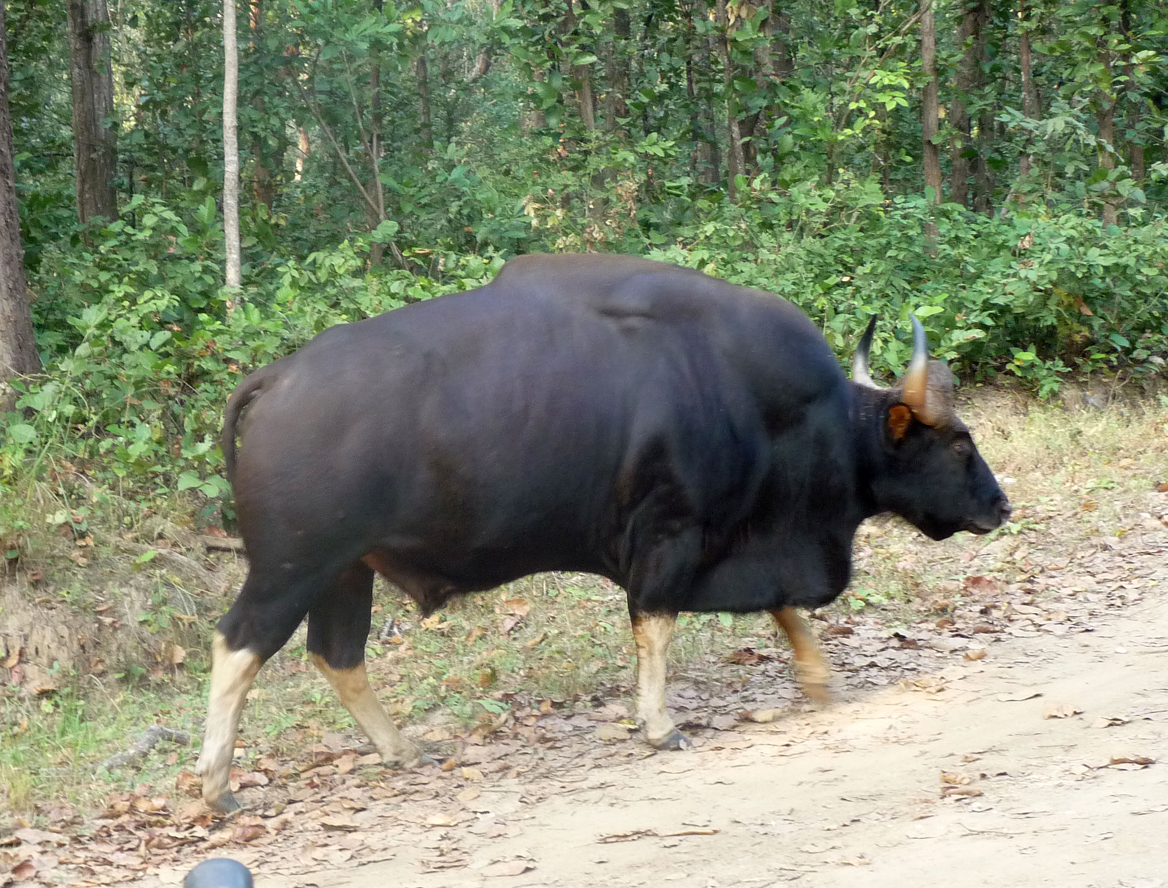 Gaur. or Indian Bison. Bos guarus